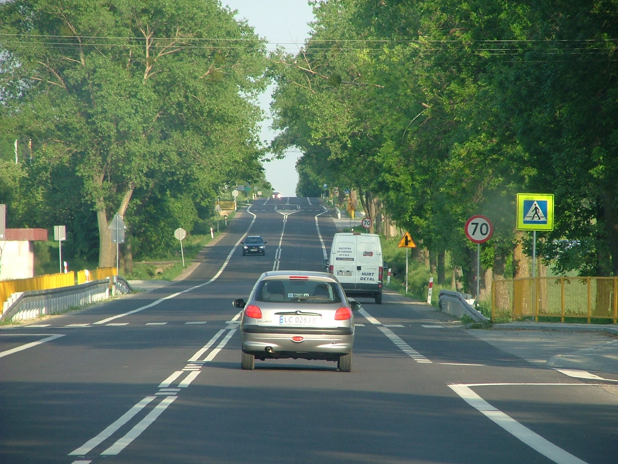 PL, Janów (powiat chełmski), gmina Chełm, województwo lubelskie, gmina Chełm, Droga E373